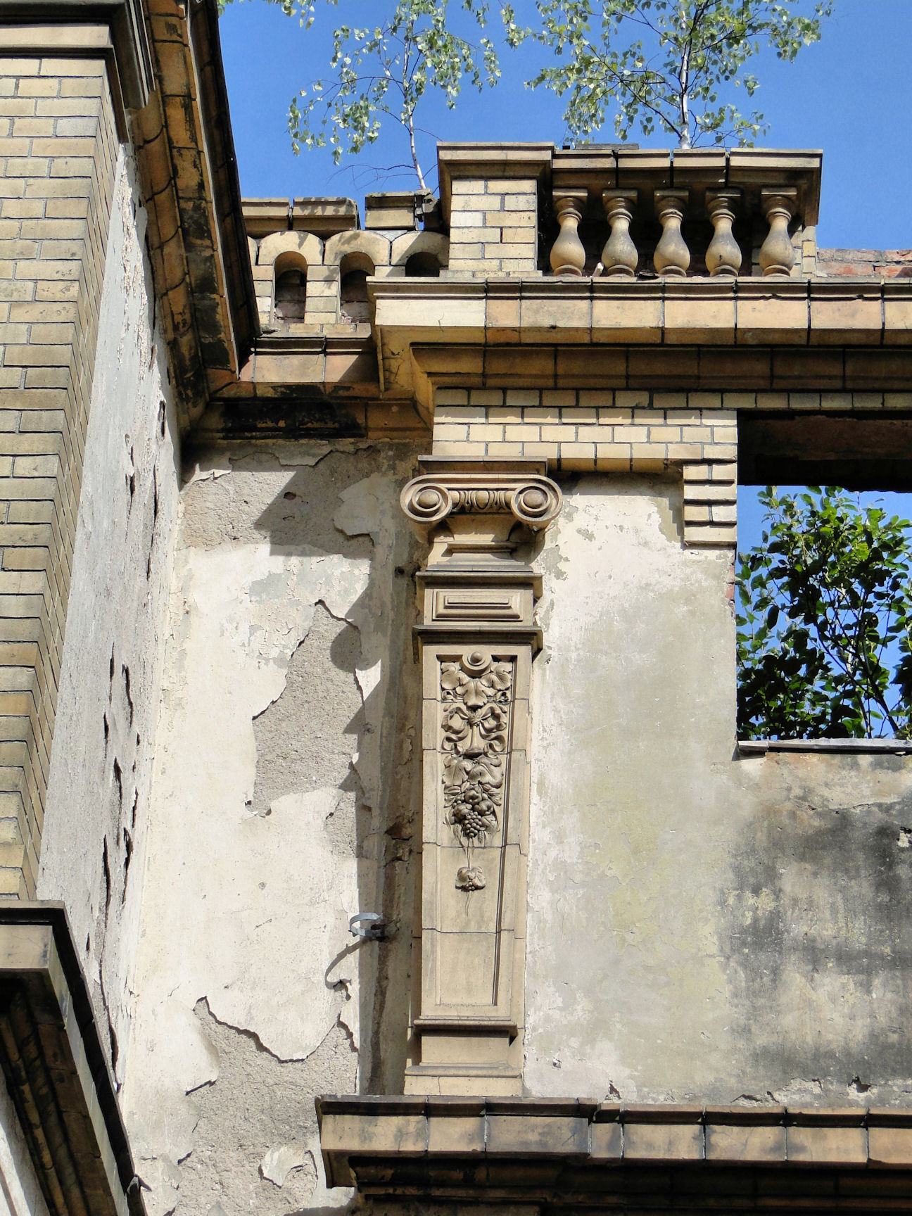 Witnica - folwark (zespół), pałac (ruina)